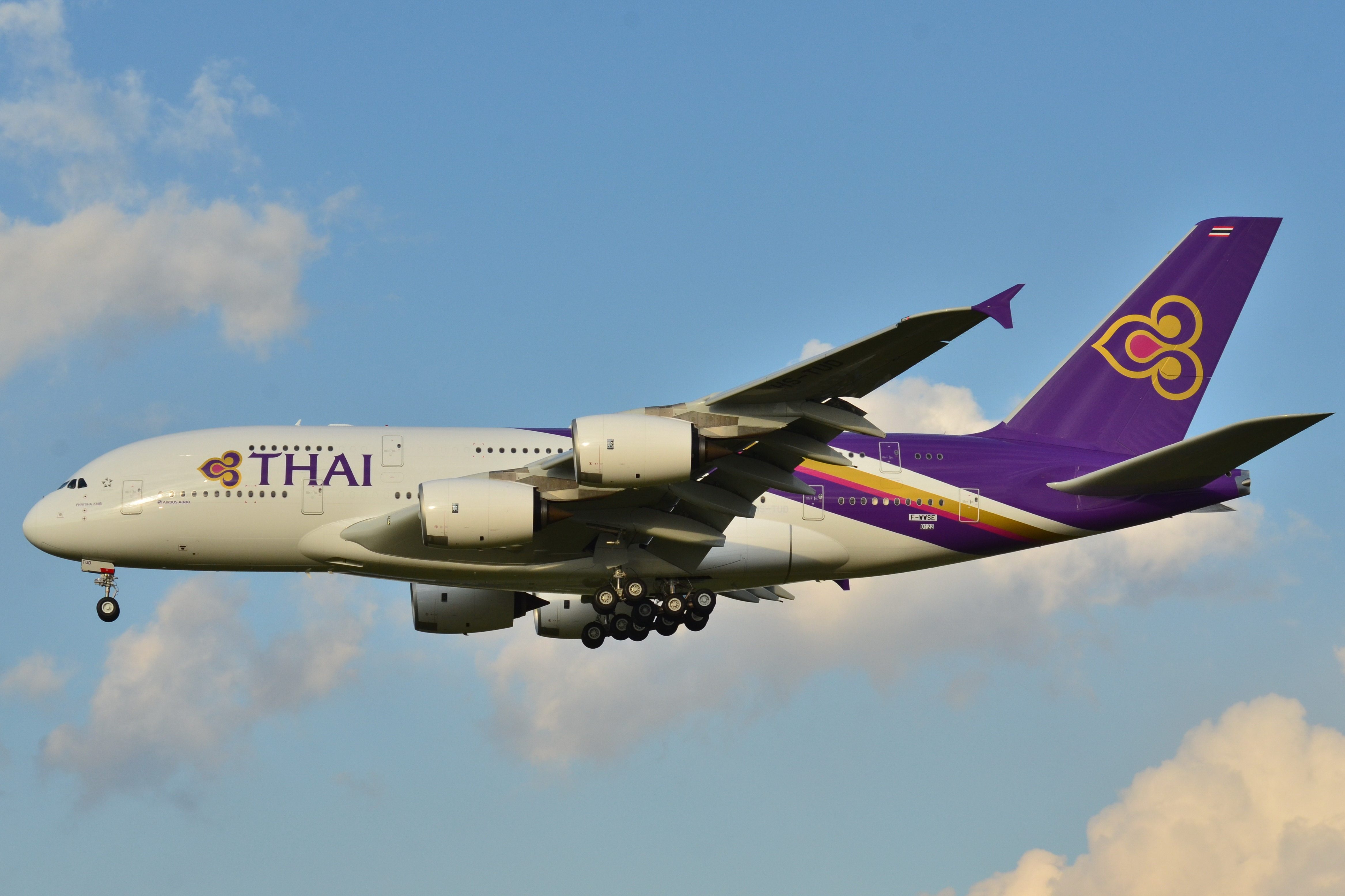 Photo prise à l'aéroport de Toulouse-Blagnac (LFBO) en France. Picture take at Toulouse-Blagnac Airport (LFBO) in France.